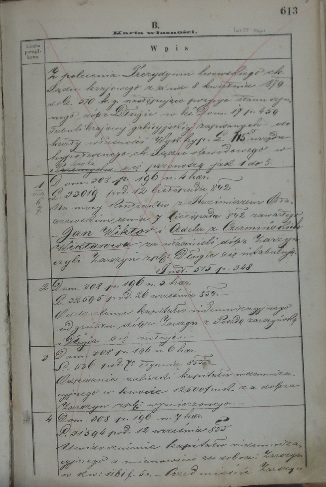 Karta z księgi tabularnej dóbr Długie w Sądzie Rejonowym w Sanoku